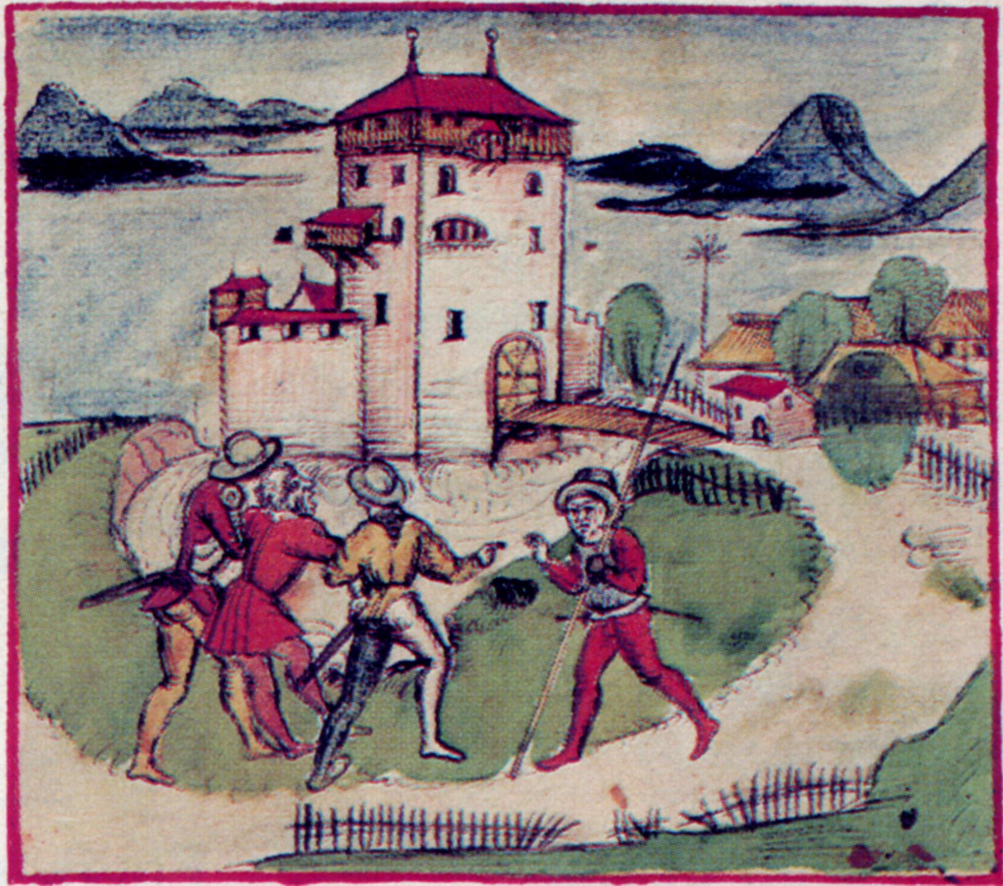 Der Bote von Gersau wird bei Pfäffikon SZ von den Zürchern, denen er den Absagebrief überbringen soll, aufgegriffen. Die Zürcher drohen ihn zu ertränken. Während des Alten Zürcherkrieges, 1440